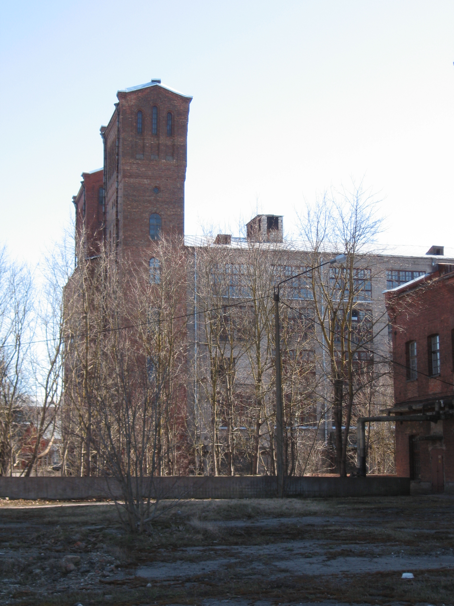 Kreenholmi Georgi vabriku hoone